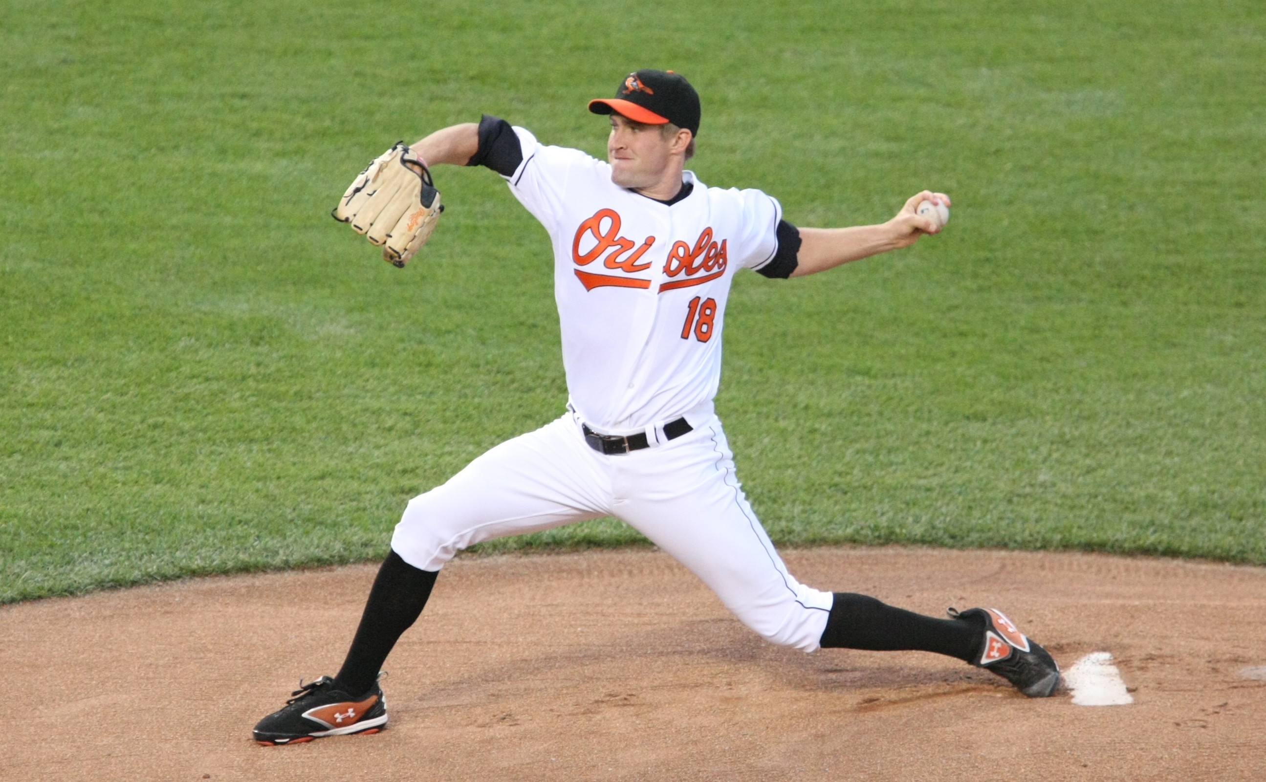 Garrett Olson